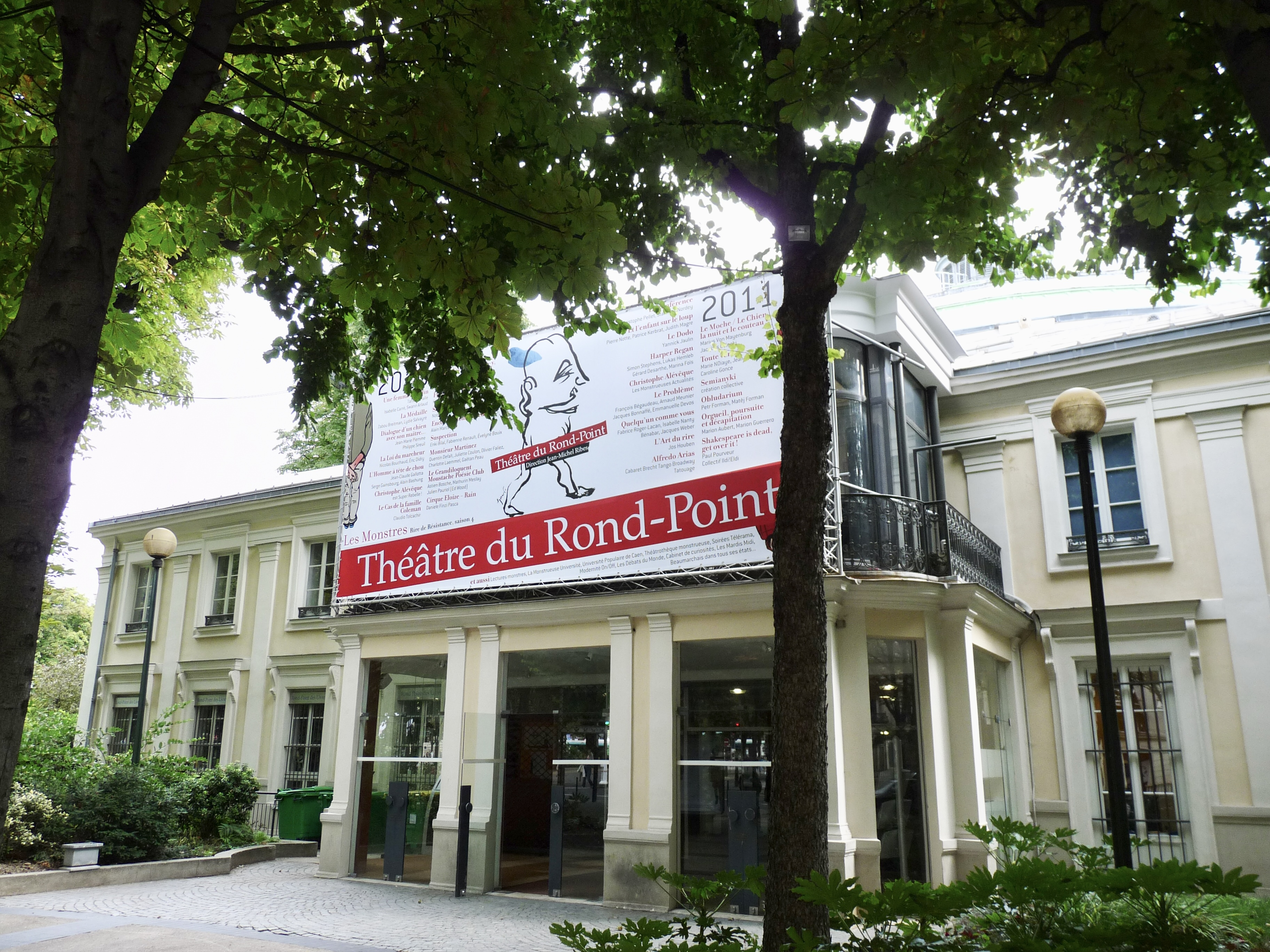 Le théâtre du Rond Point à Paris